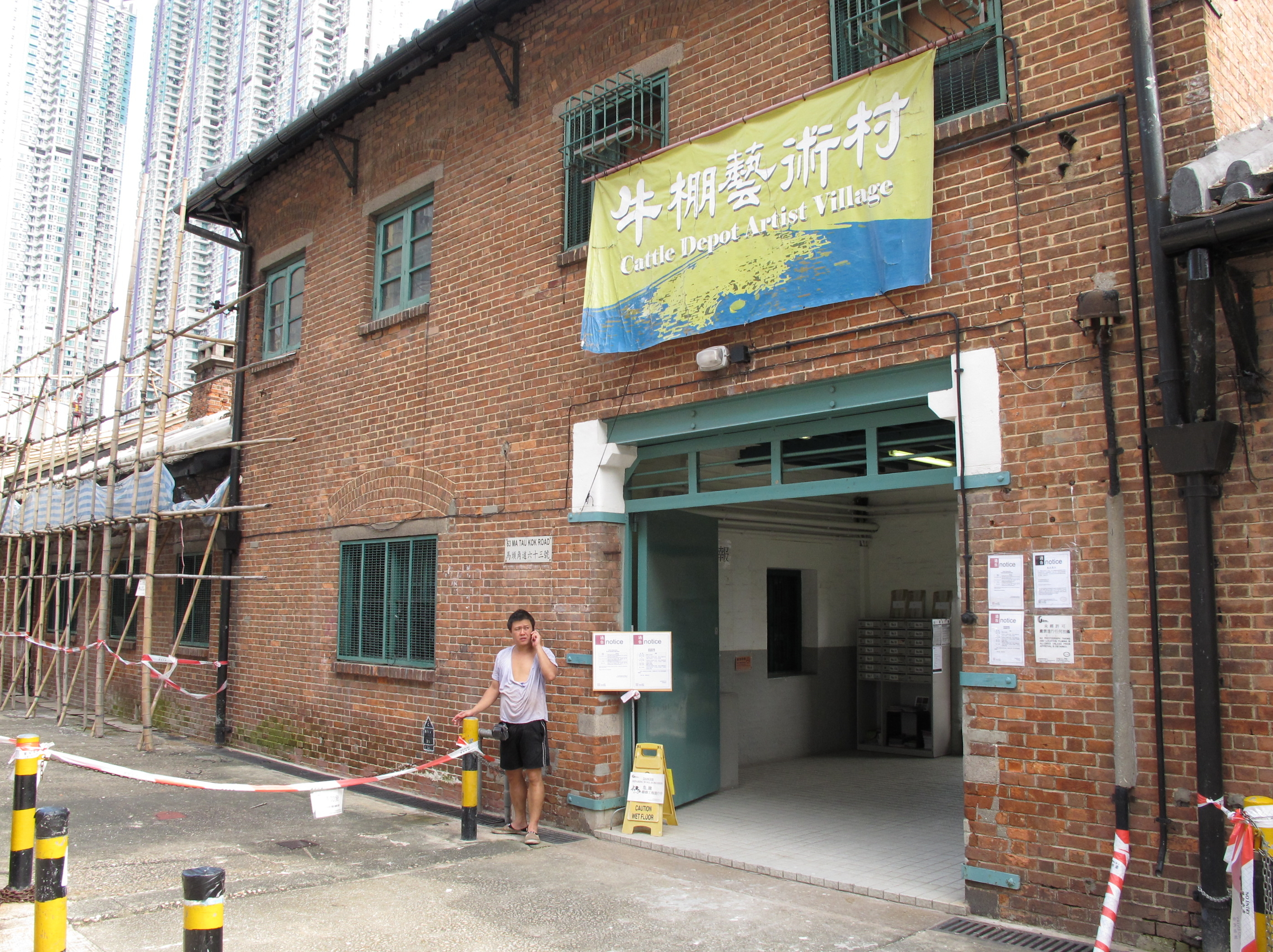 Cattle Depot Artist Village 牛棚藝術村